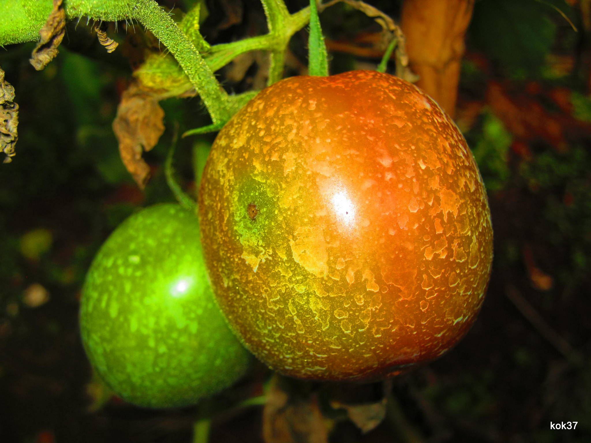 La tomate est le condiment presque le plus utilisé par les cuisiniers du monde. Elle est réputée lutter efficacement contre le cancer de la prostate chez les hommes.